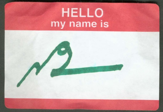 nomŝildo anglalingva kun nomo en ĉinuka piĝino, en la skribsistemo "Kamlups wawa"